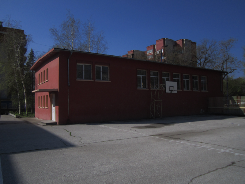 Физкултурният салон на училището. Снимка: училищен архив